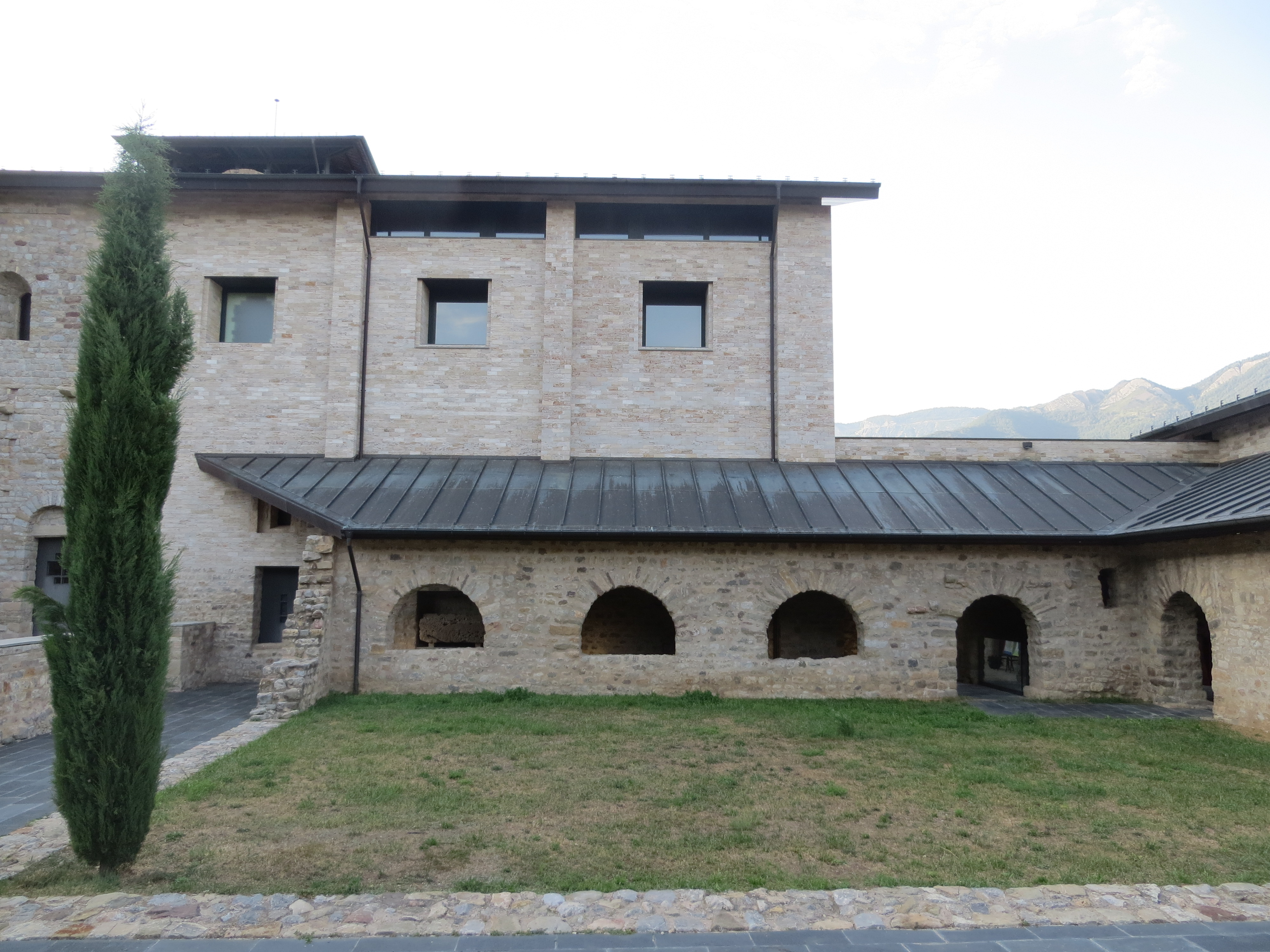 Claustre del Monestir de Sant Llorenç prop Bagà, a Guardiola de Berguedà